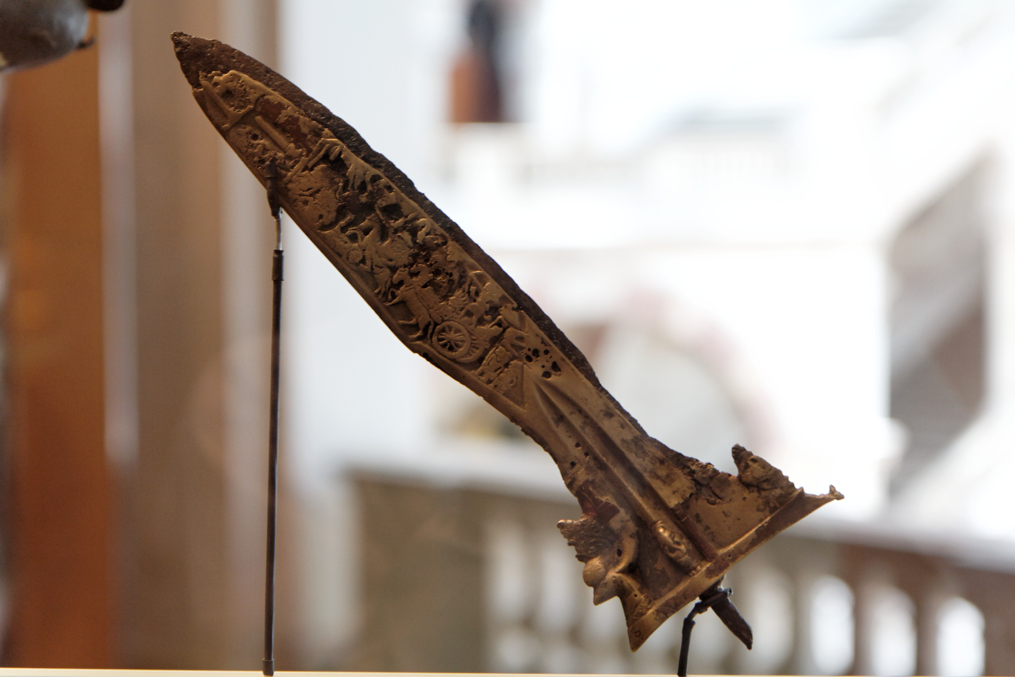 Kris Van Knaud (6046-1) 090612-122915_ 0447_350D_raw